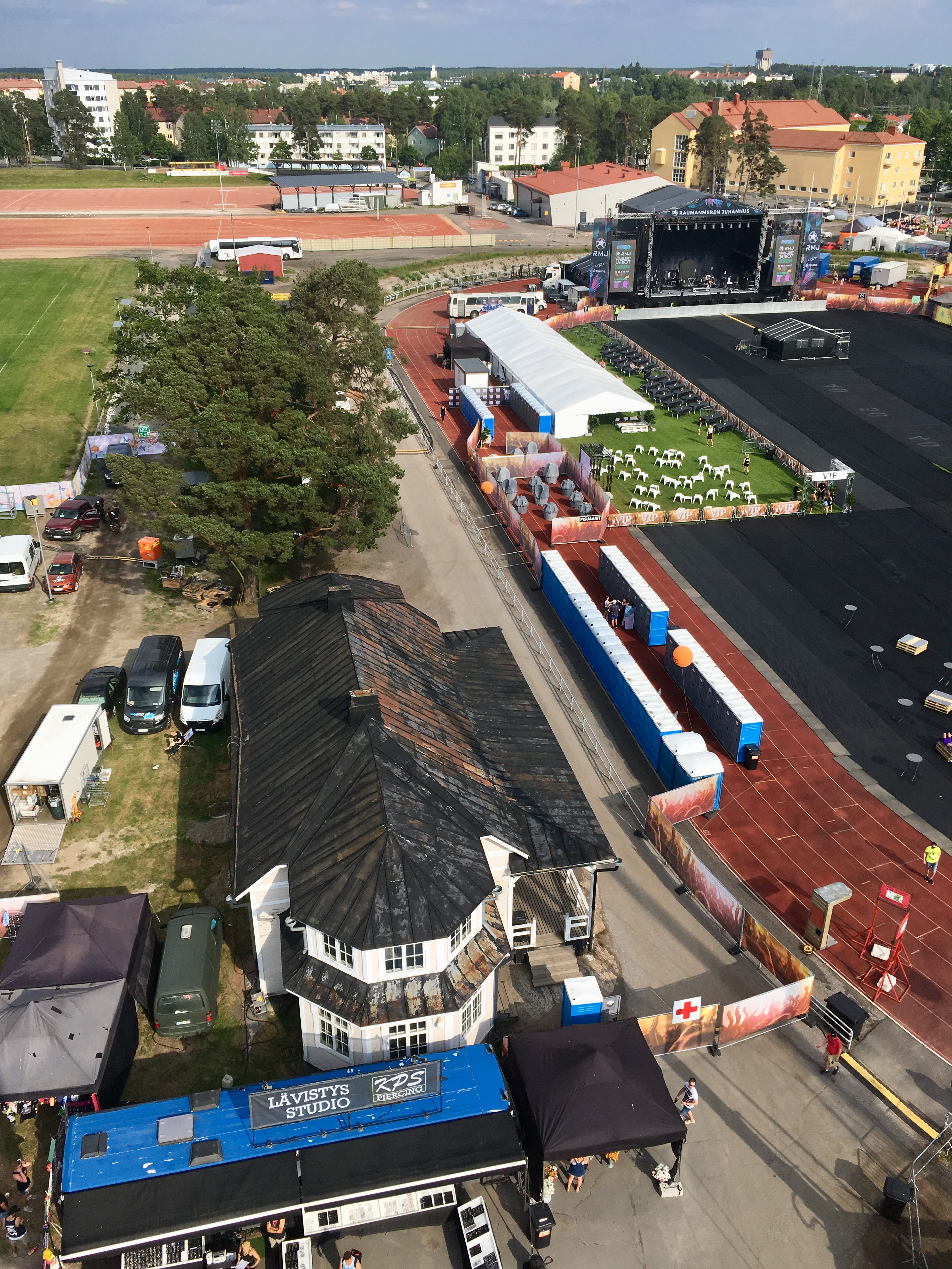 Otanlahden stadion ja RMJ:n festivaalialue vuonna 2019 nähtynä tivolilaitteesta.